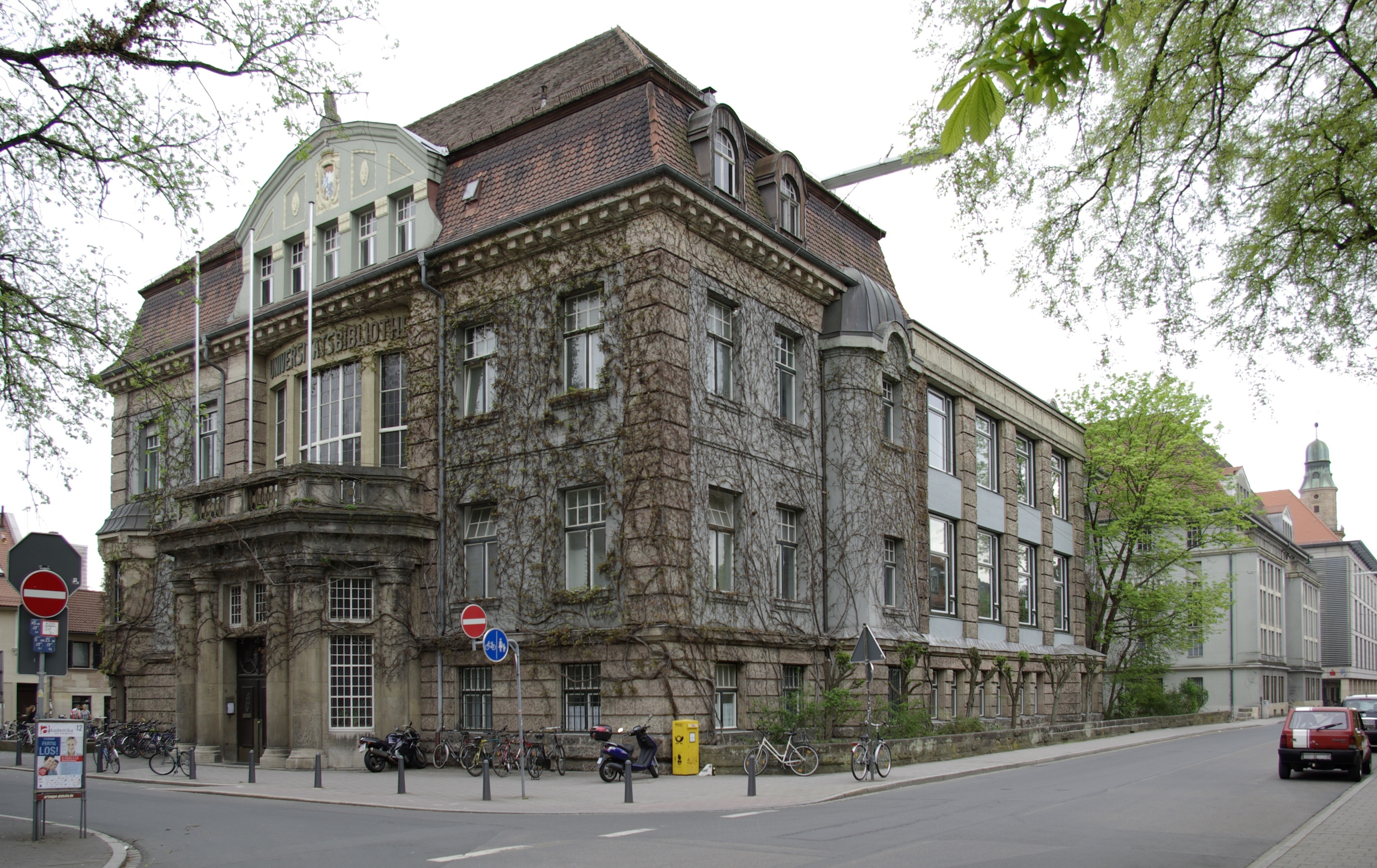 Altbau der Universitätsbibliothek in Erlangen